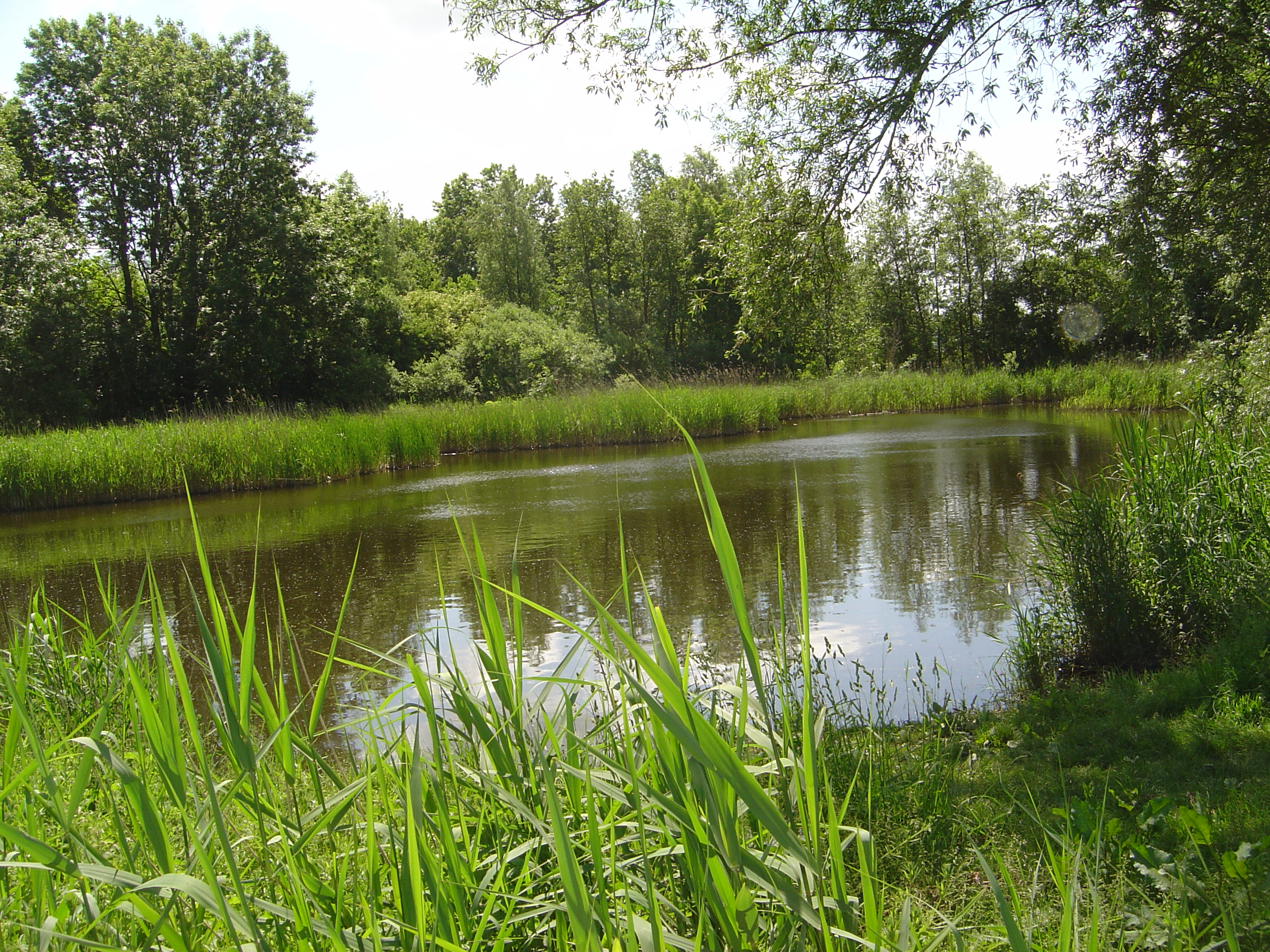 Het hart van het Beusebos. Voor velen is dit het mooiste plekje. Maar tijdens een wandeling op de paden tussen de duizenden bomen zijn voor de echte natuurliefhebber nog veel meer prachtige pareltjes te ontdekken. Alles groeit en bloeit hier op puur natuurlijke wijze.